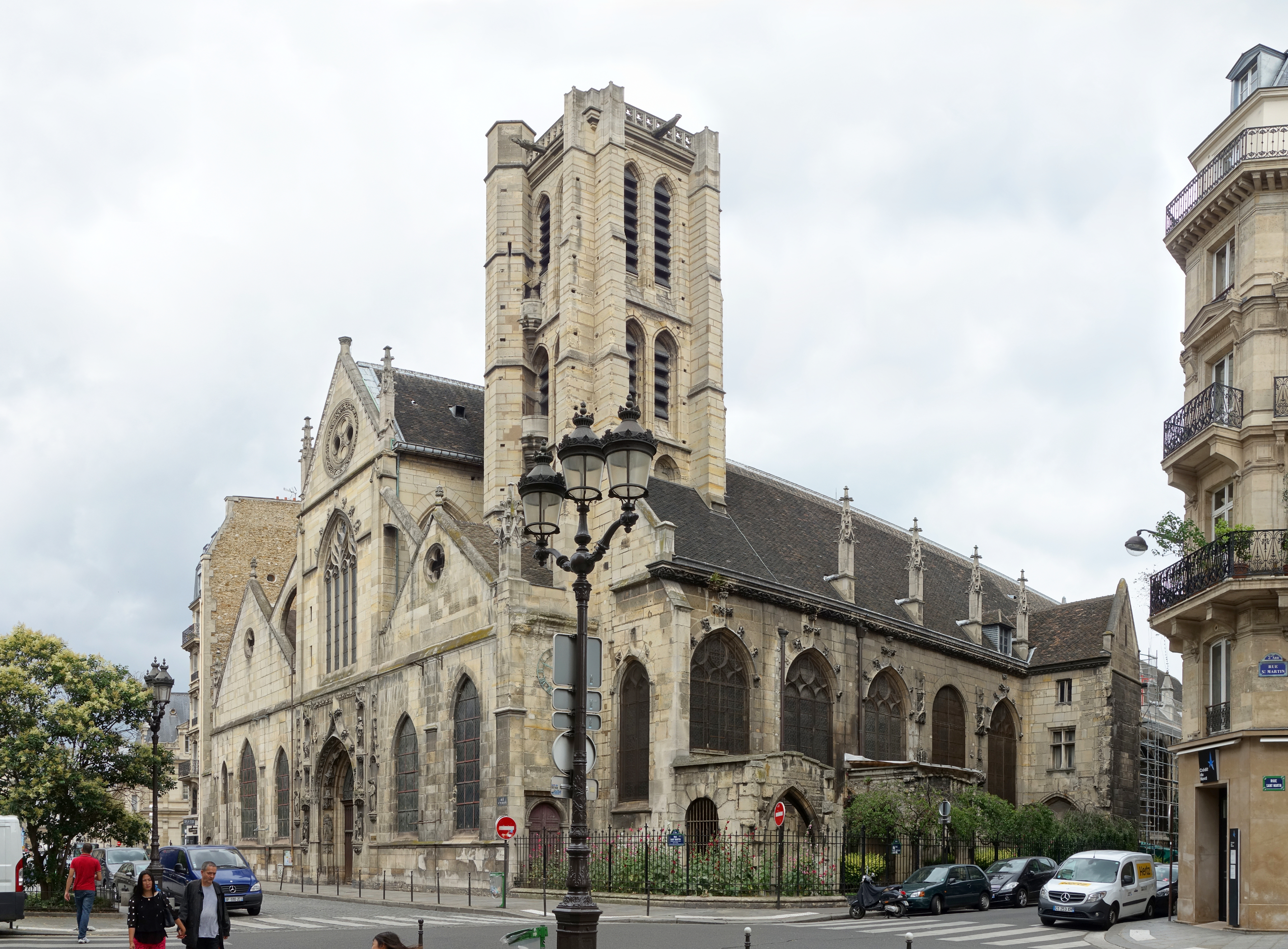 L'église Saint-Nicolas-des-Champs à Paris, angle des rues Saint-Martin et Cunin-Gridaine.